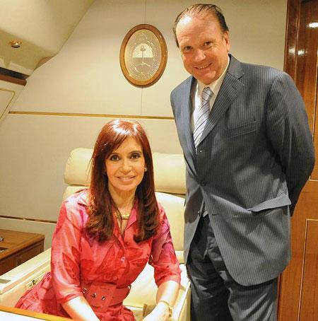 Presidenta Fernández de Kirchner y Raúl Othacehé, intendente del Partido de Merlo, Provincia de Buenos Aires, Argentina.